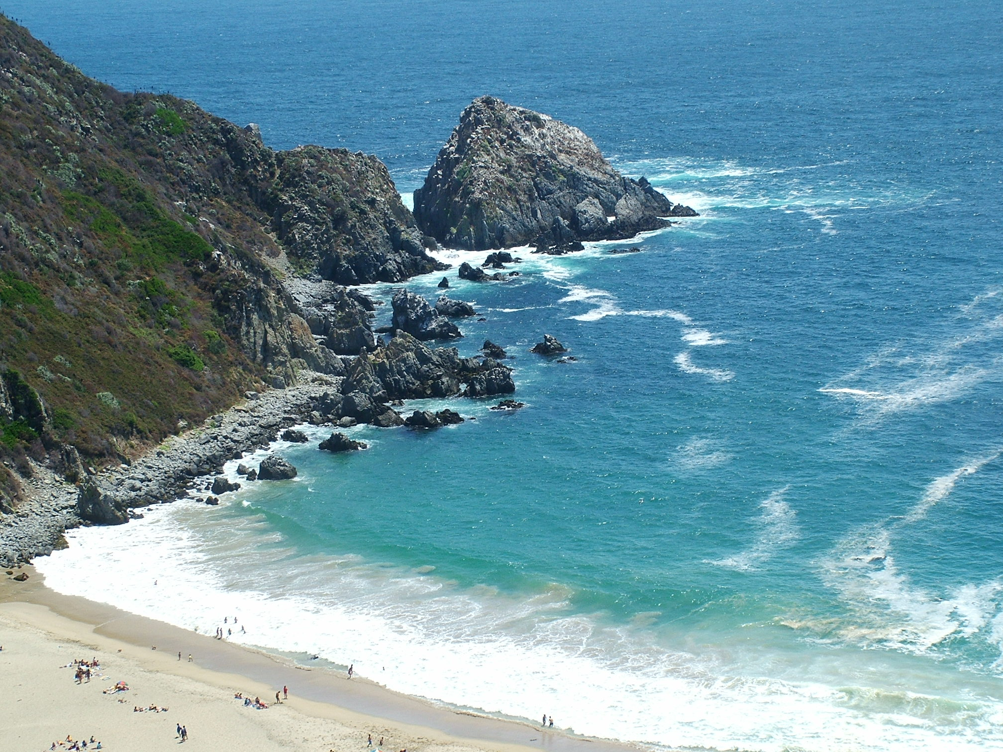 Playa Las Docas, a la que accede pasando Laguna Verde, a unos 25 km de Valparaíso, Quinta Región, Chile